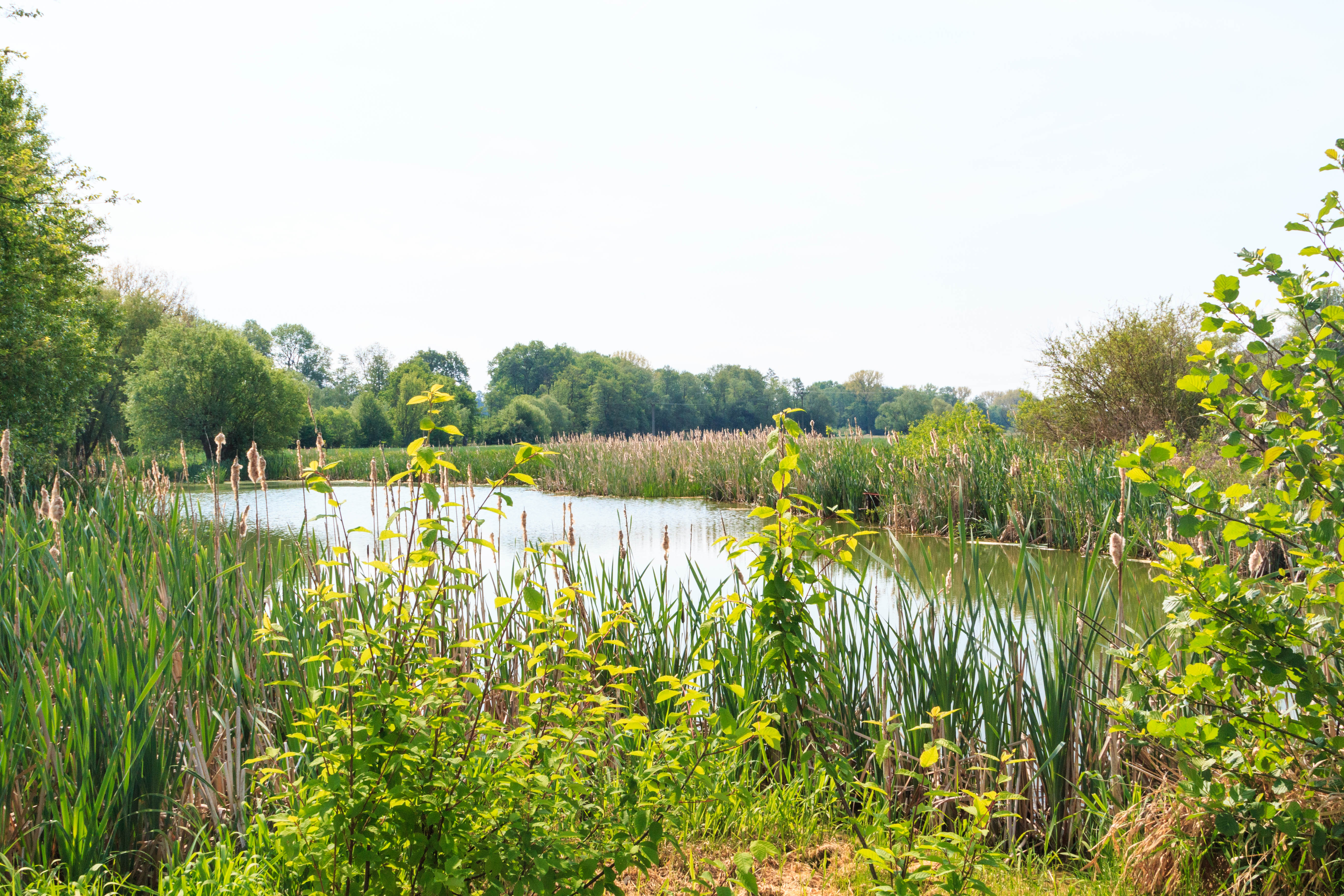 Hatě u Hostovic - odstavené rameno Chrudimky Project: Vodstvo.